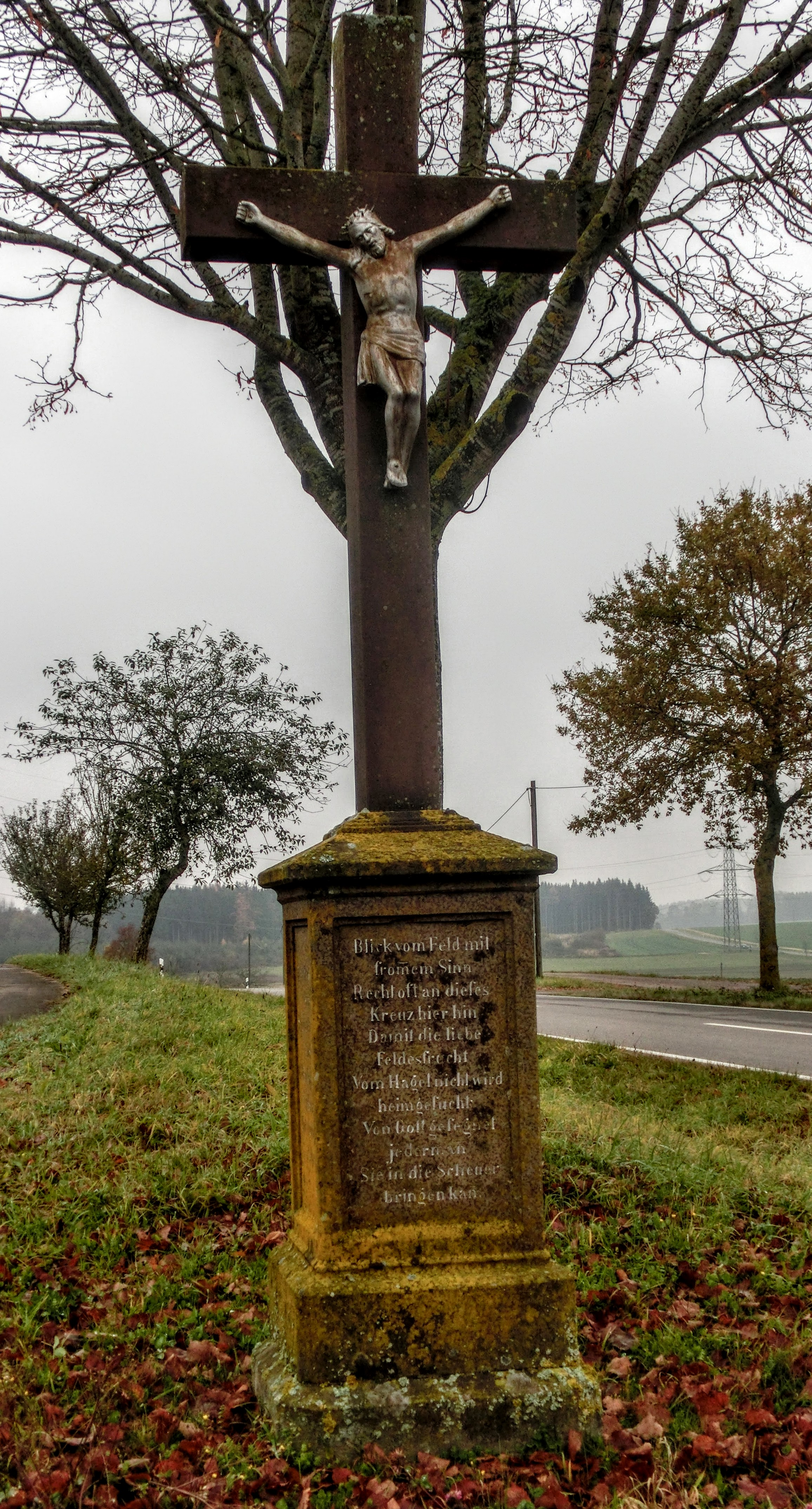 Deutschland (D) - Baden-Württemberg (BW) - Landkreis Konstanz (KN) - Mühlingen, Ortsteil Mainwangen: Flurkreuz an der Meßkircher Straße beim Friedhof